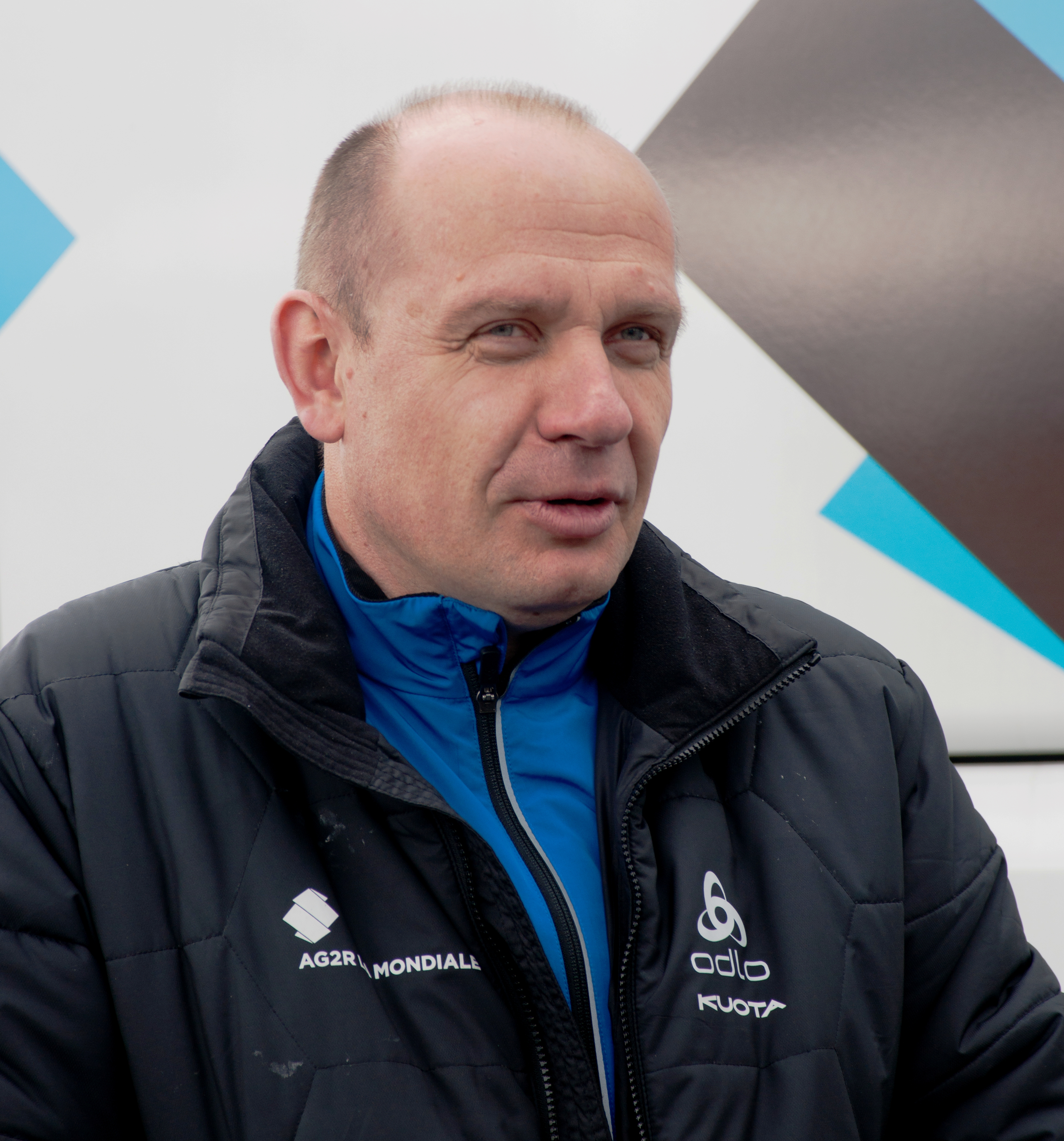 Artūras Kasputis lors du prologue du Tour de Romandie 2012